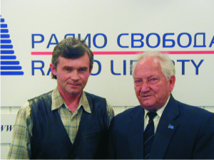 Сергей Виноградов и Виктор Шаталов